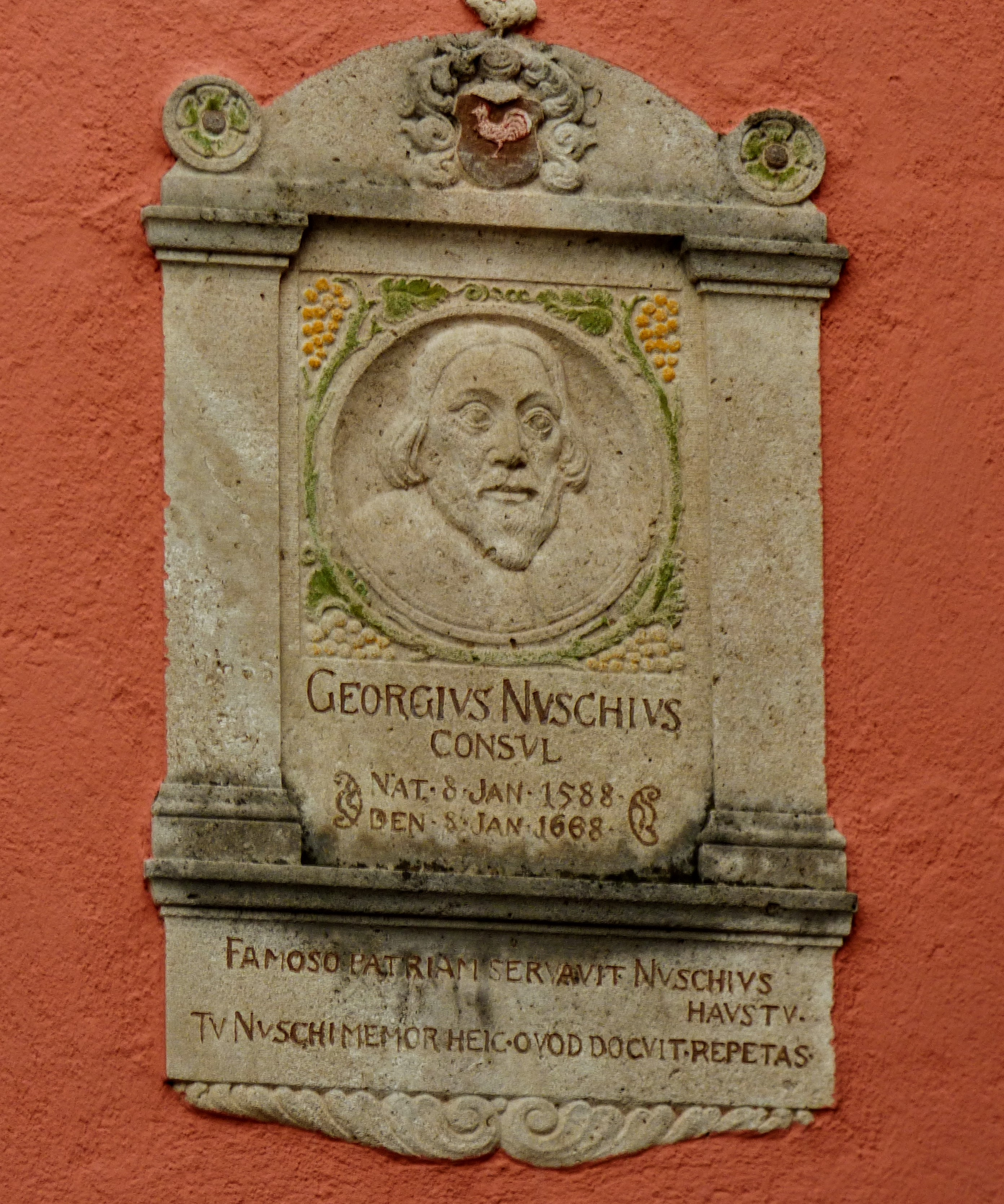 Georg Nusch, Bildnis an Fassade in Rothenburg ob der Tauber